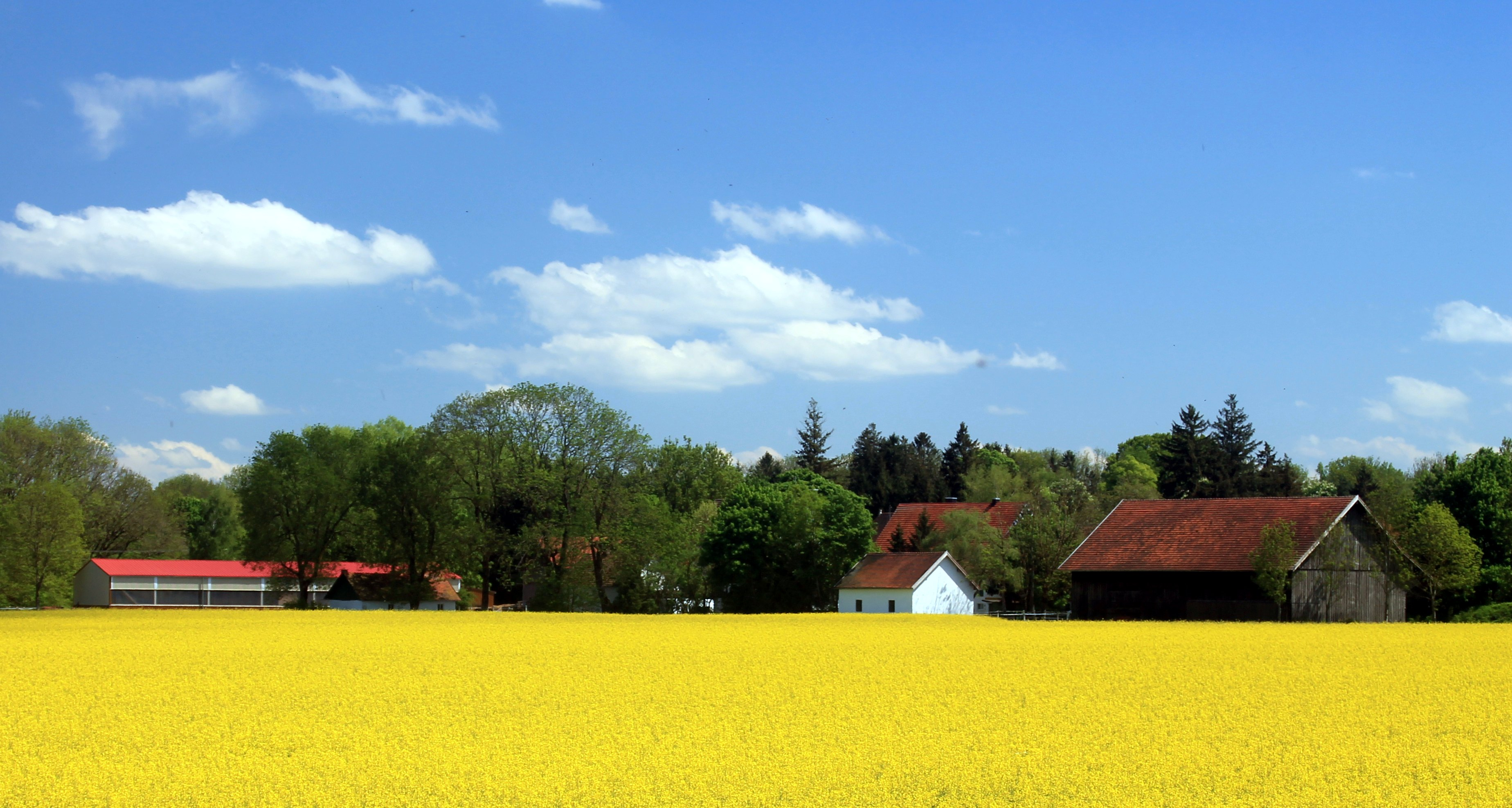 Nordwestansicht von Unterirsingen (Zollhaus), ein Ortsteil von Türkheim. Rapsfeld im Vordergrund